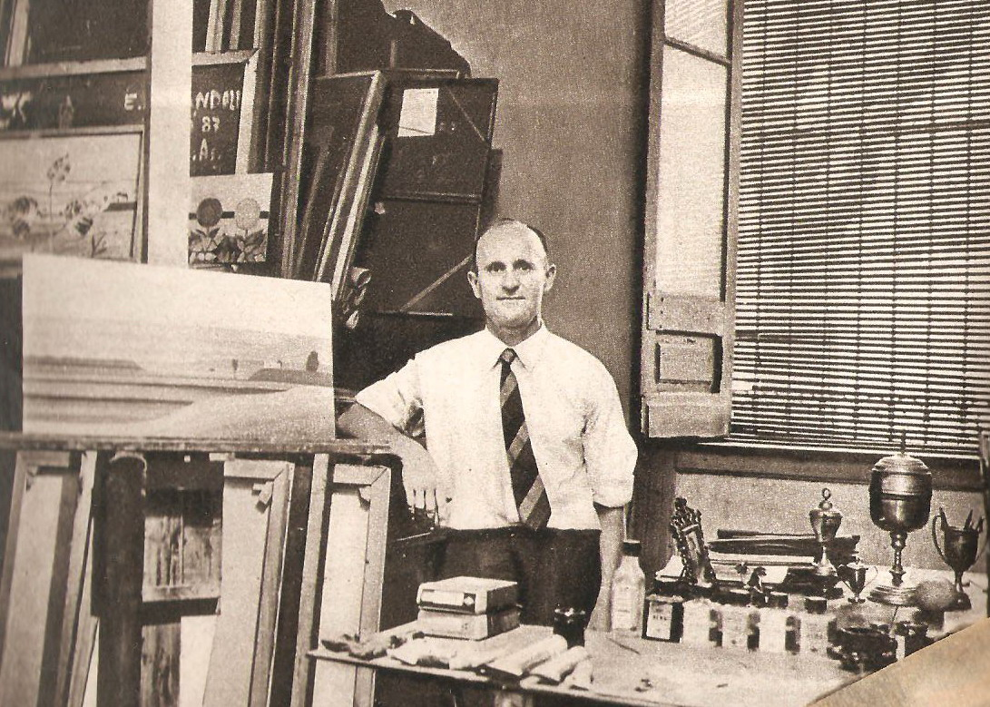 Enrique Gandolfo